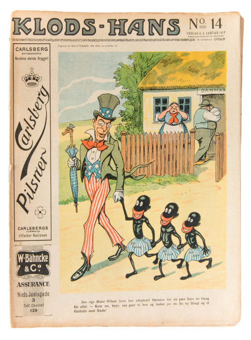 Forside af det satiriske blad Klods-Hans